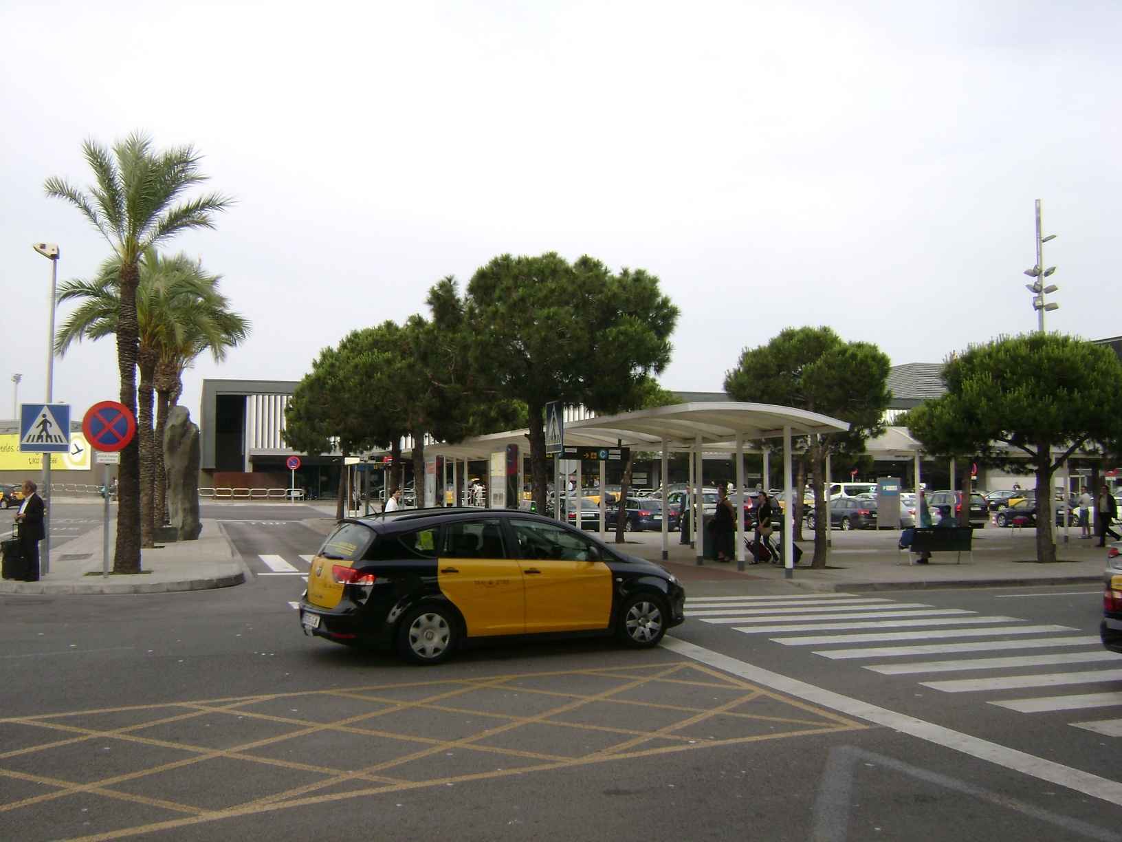 Aeroport de Barcelona, T-2, C